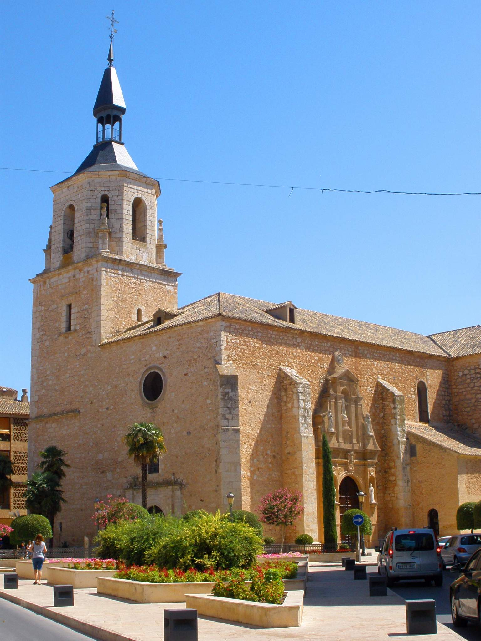 Iglesia de San Pedro Apóstol (Daimiel, Ciudad Real)